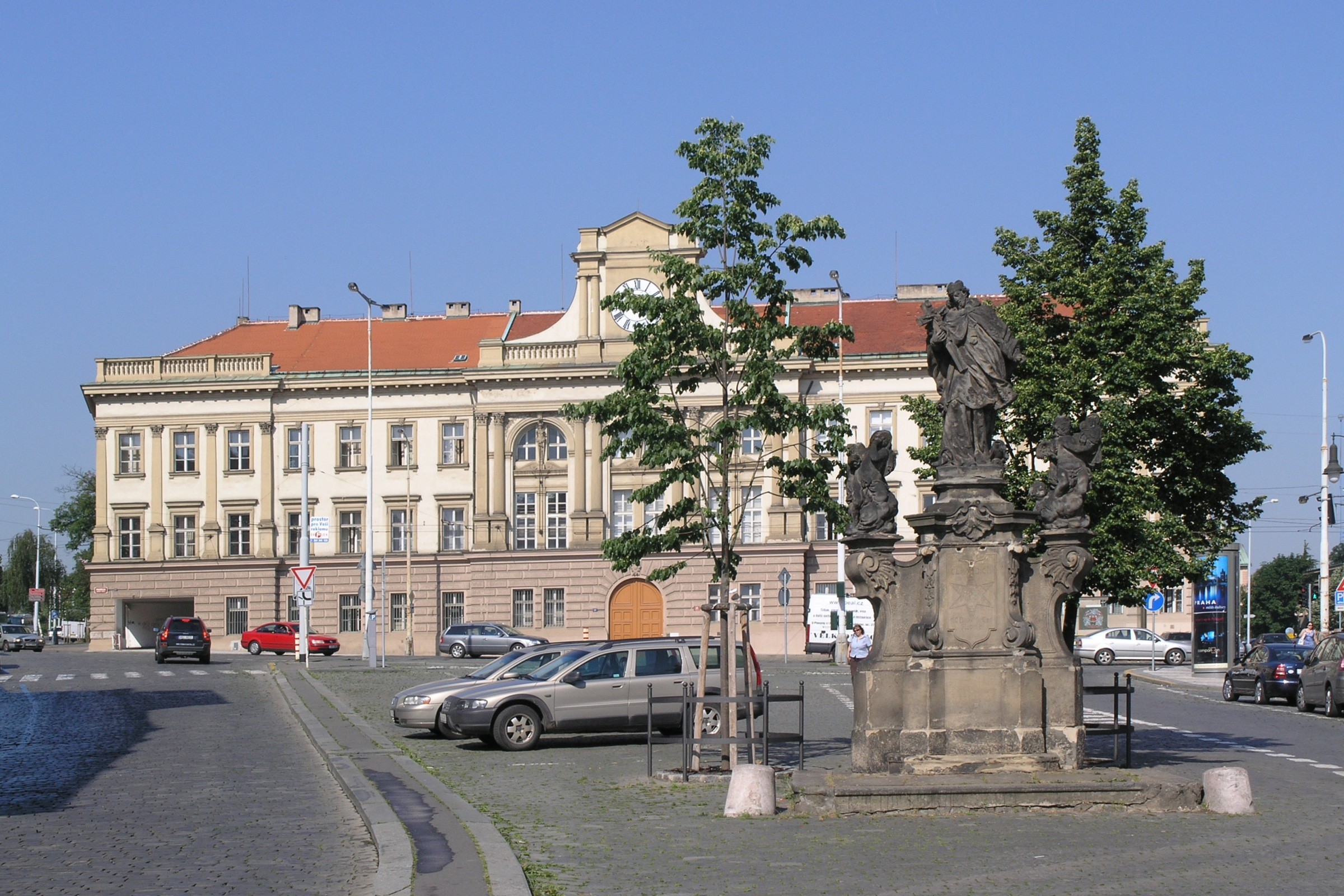 Praha, Hradčany - svatý Jan Nepomucký na Pohořelci v pozadí s kasárnami